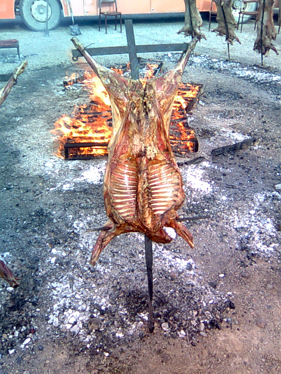 Es Una Fotografia tomada en un asado criollo en la proviacia de Santa Cruz(Argentina)